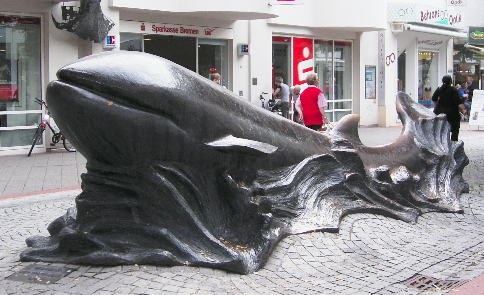 Bronzeplastik Wal in der Gerhard-Rohlfs-Straße in Bremen-Vegesack